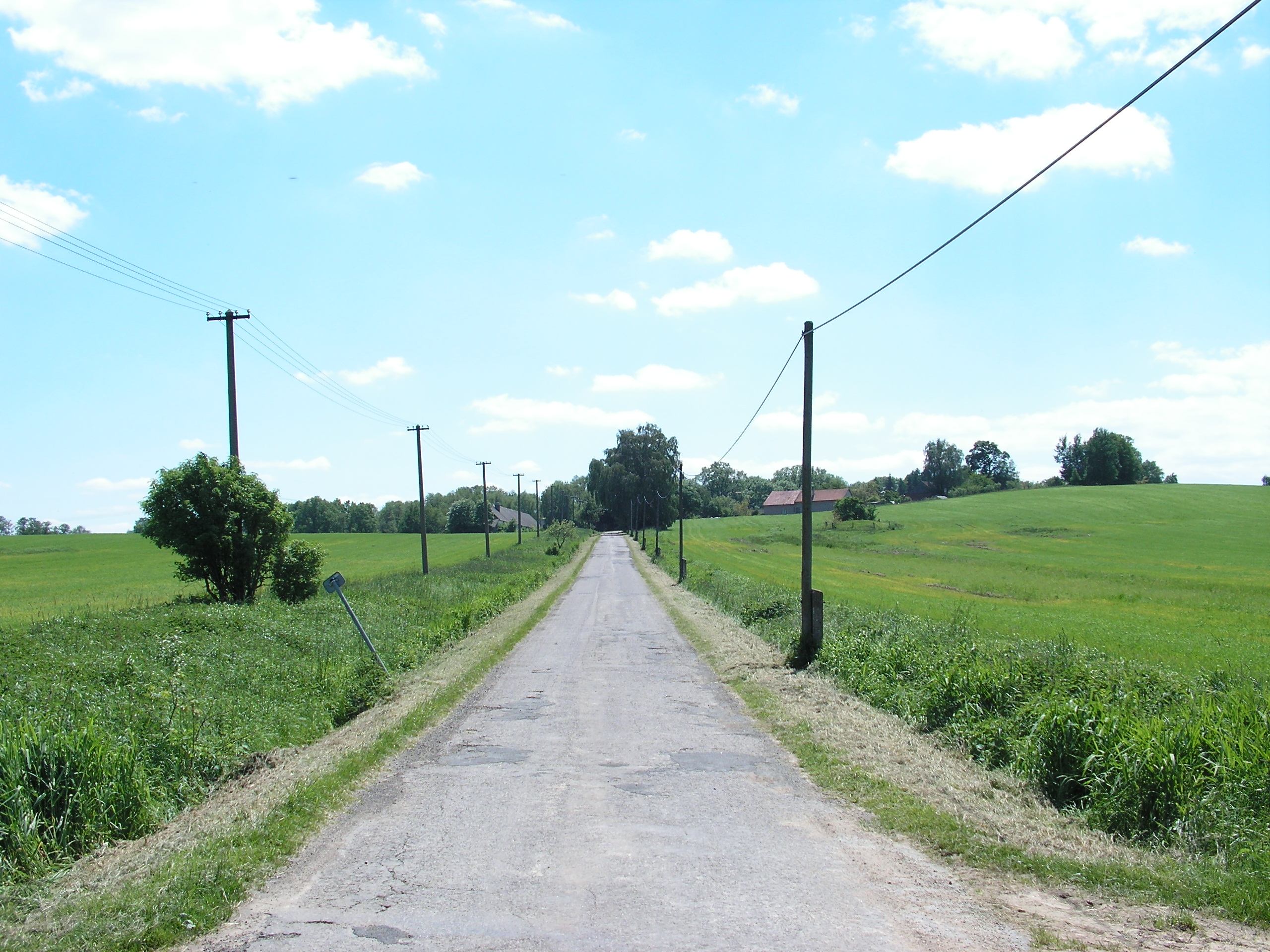 Pohled od Kysibelského mlýna na vesničku Lubno, která se nachází zhruba 2,5 km jihozápadně od města Habry v okrese Havlíčkův Brod.